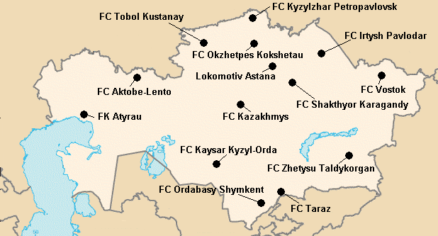 Répartition des clubs en Premier-Liga Kazakhe 2009.